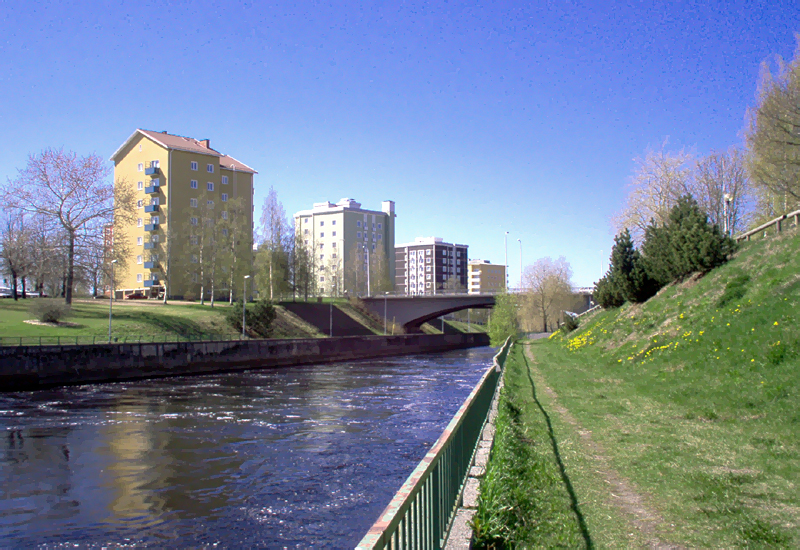 Alakanava